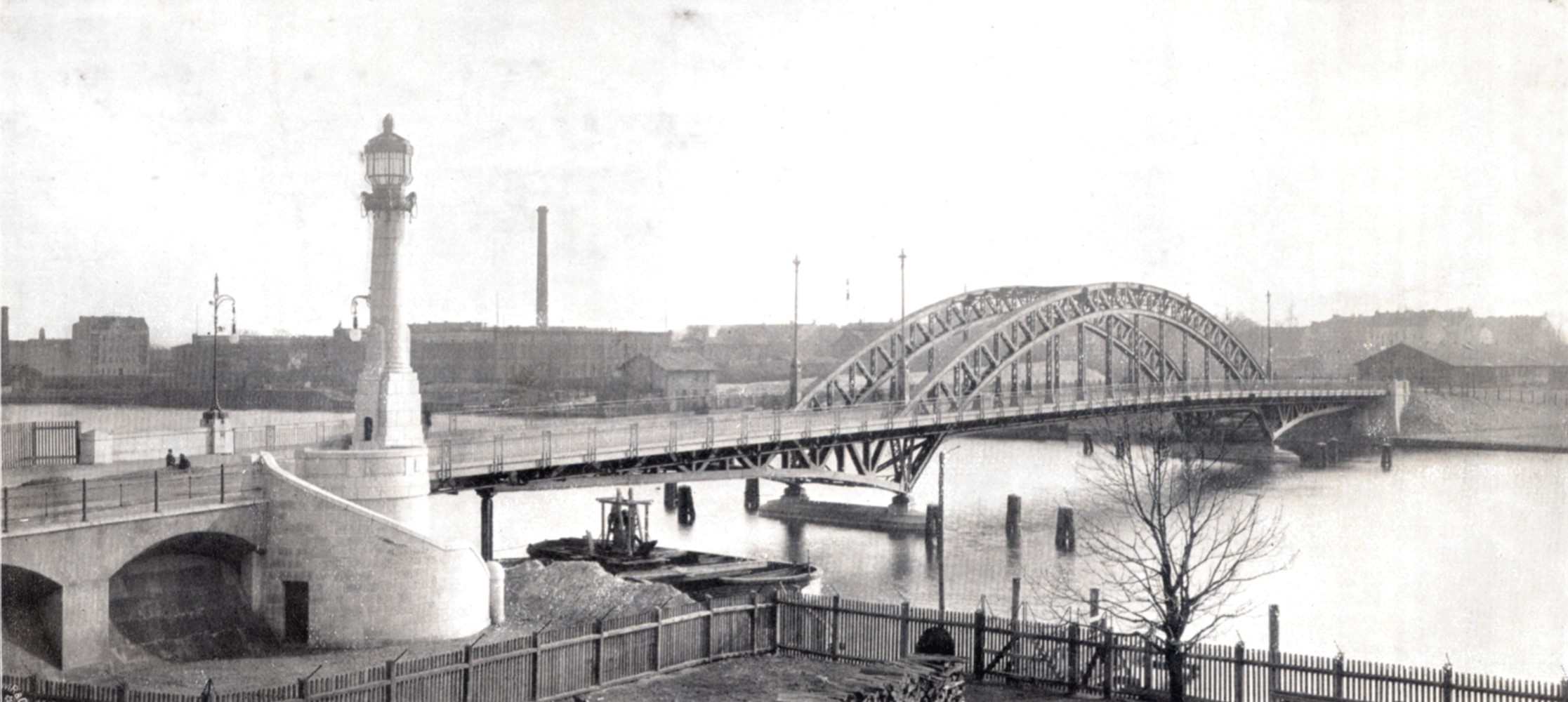 Ansicht der ersten Treskowbrücke